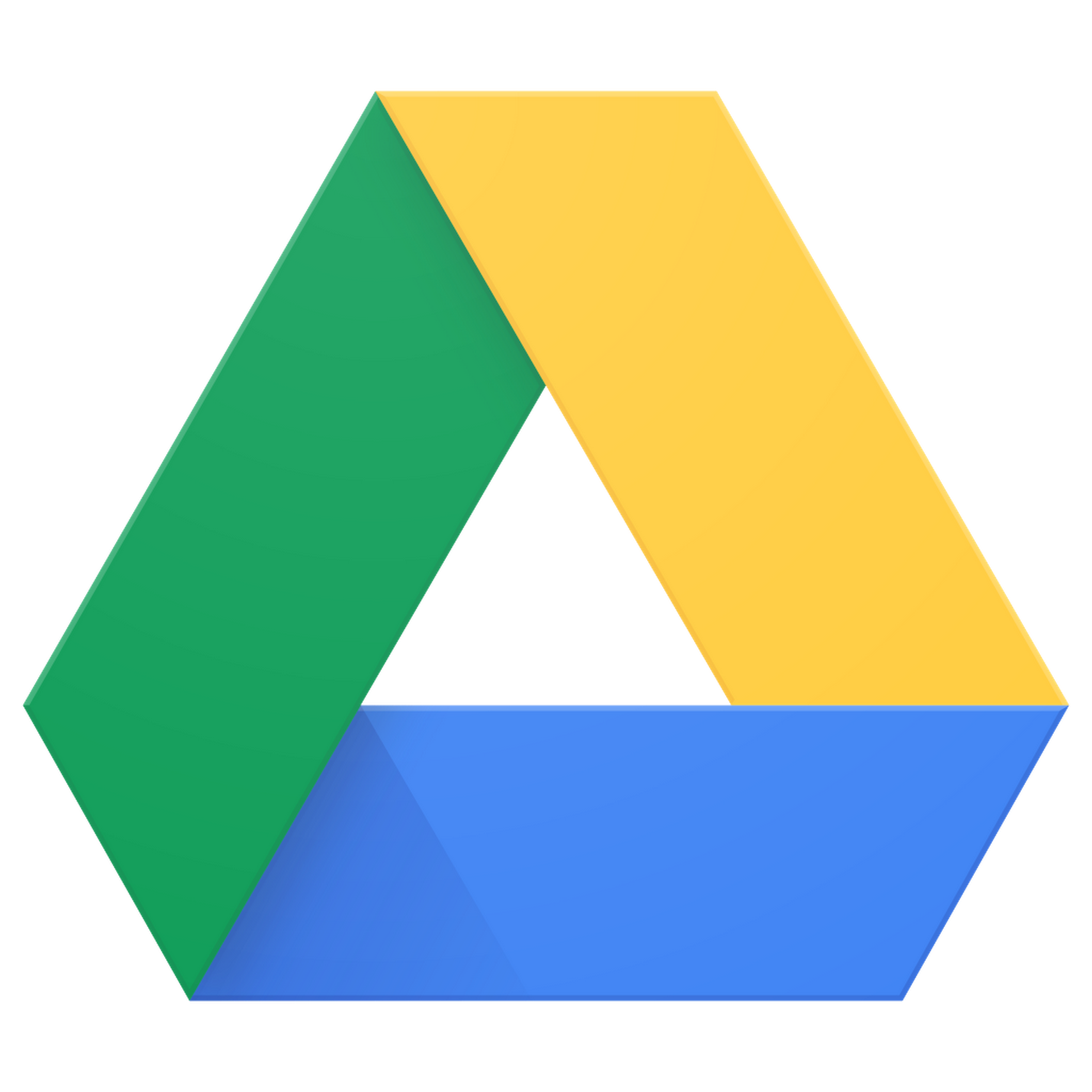 Google Drive logo